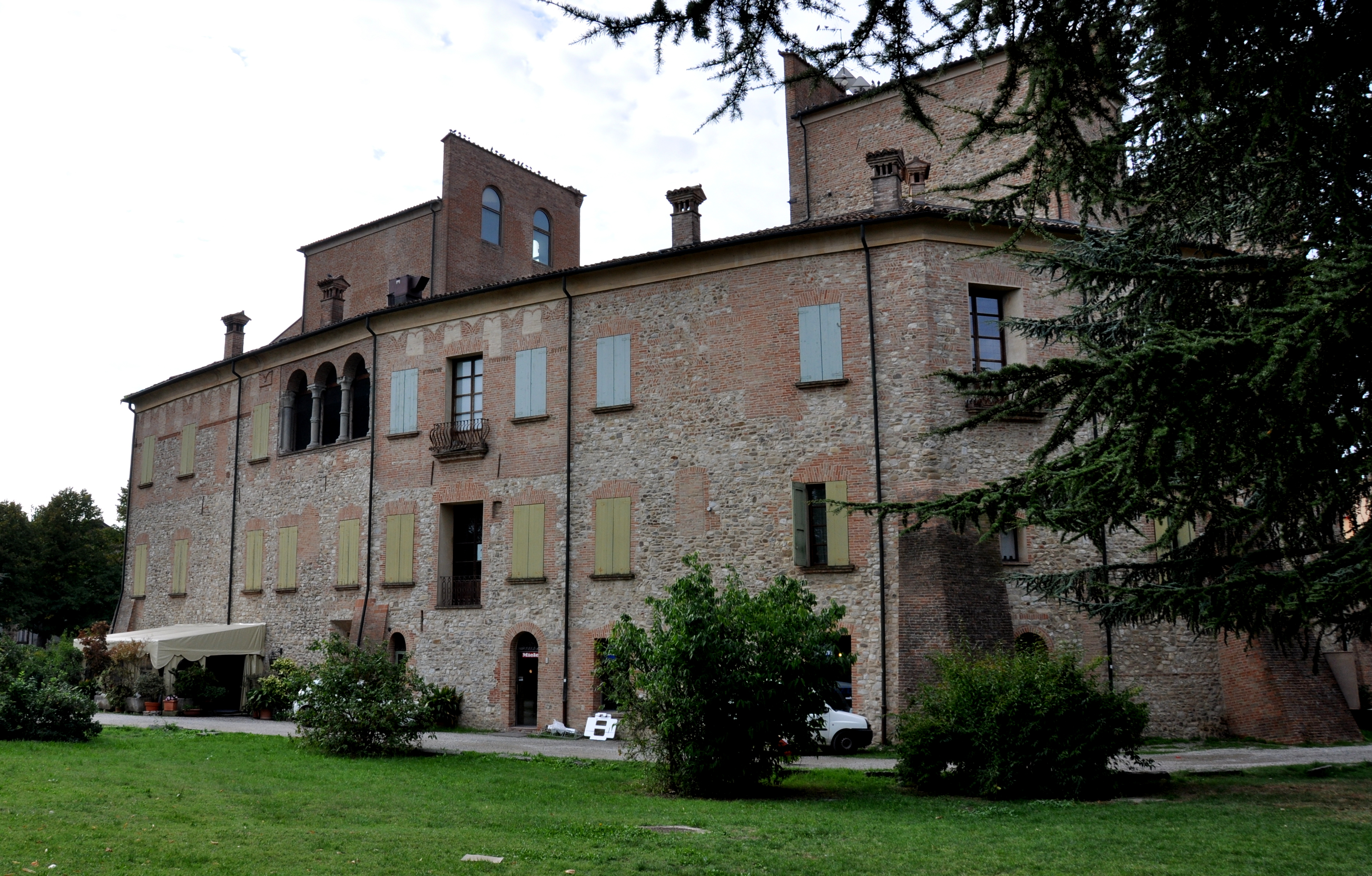 Castello di Arceto This is a photo of a monument which is part of cultural heritage of Italy.